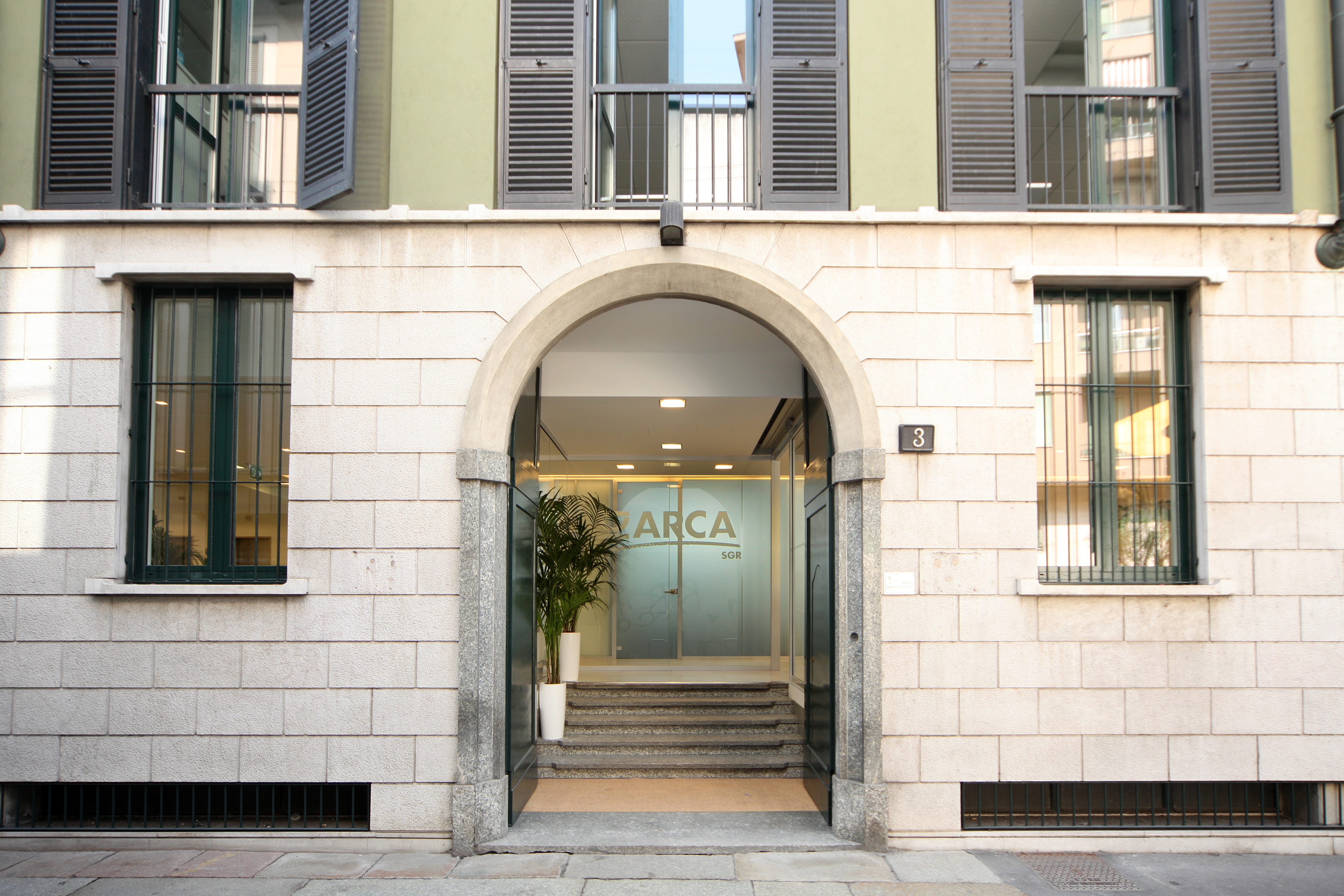 Arca Fondi HQ